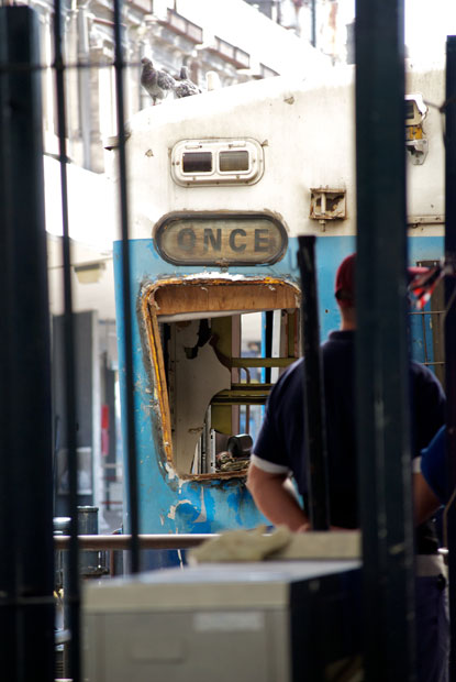 Formación del Ferrocarril Sarmiento accidentado en la estación de Once (Buenos Aires). La tragedia dejó un saldo de 49 muertos y más de 600 heridos.